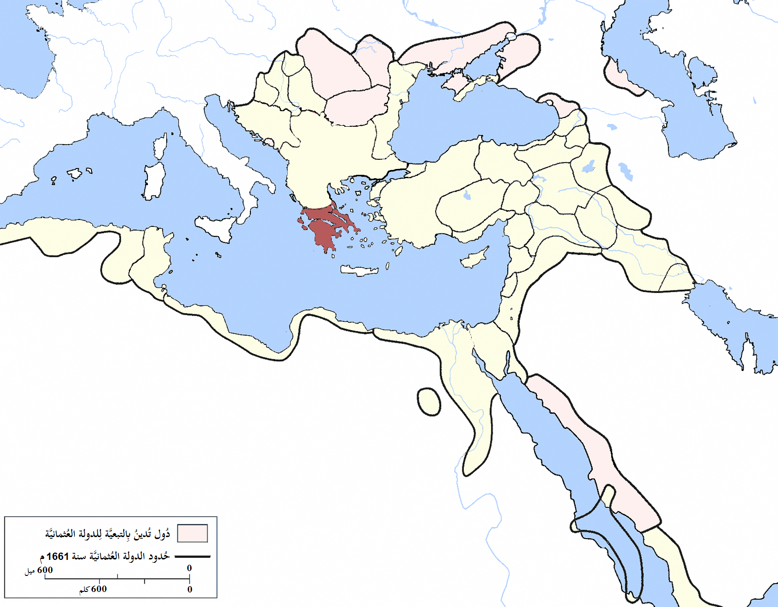 إيالة المورة في الدولة العُثمانيَّة سنة 1609م.